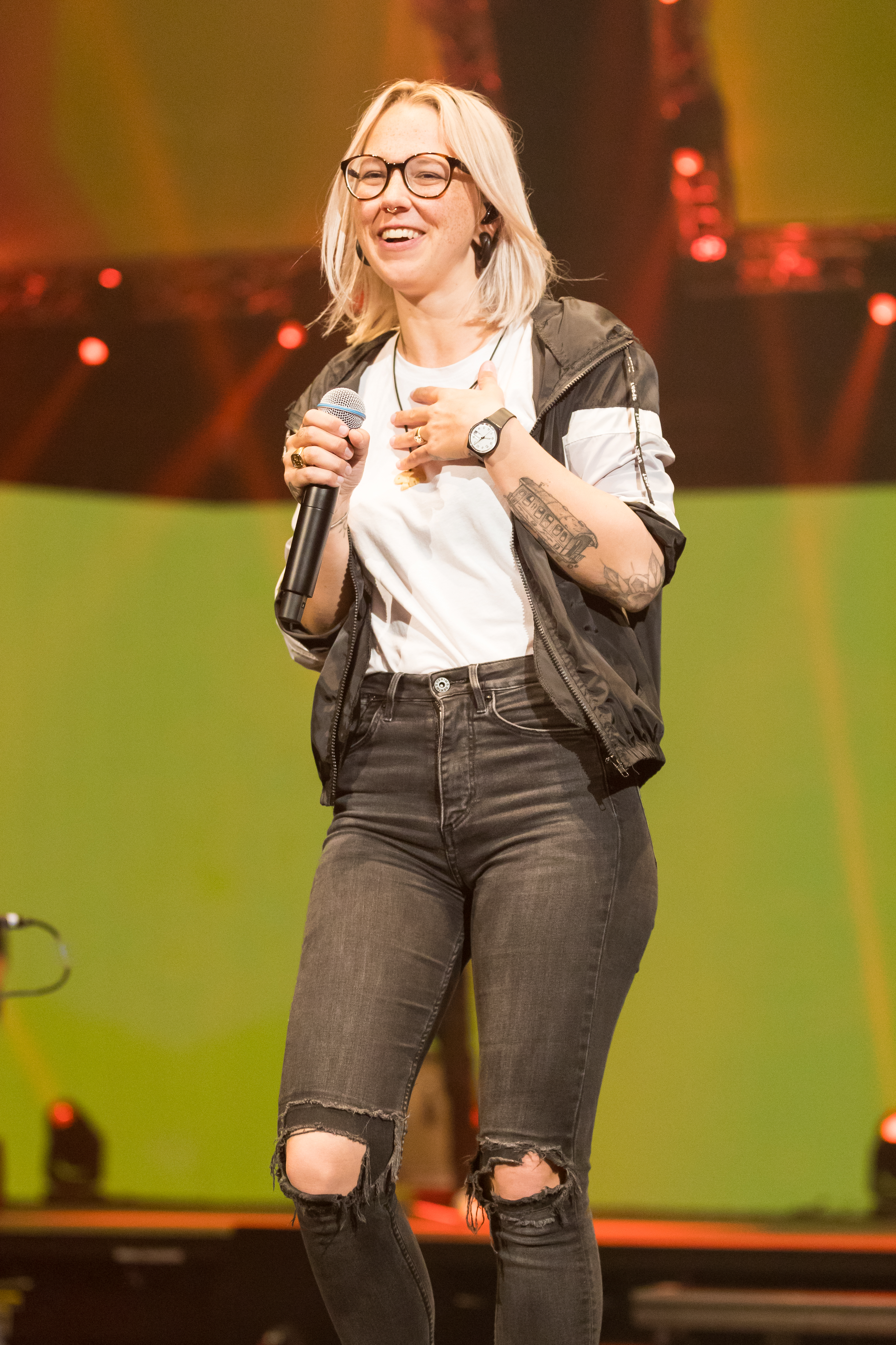 Stefanie Heinzmann during 30 Jahre Radio Regenbogen at SAP Arena, Mannheim, Mannheim, Germany on 2018-04-21, Photo: Sven Mandel